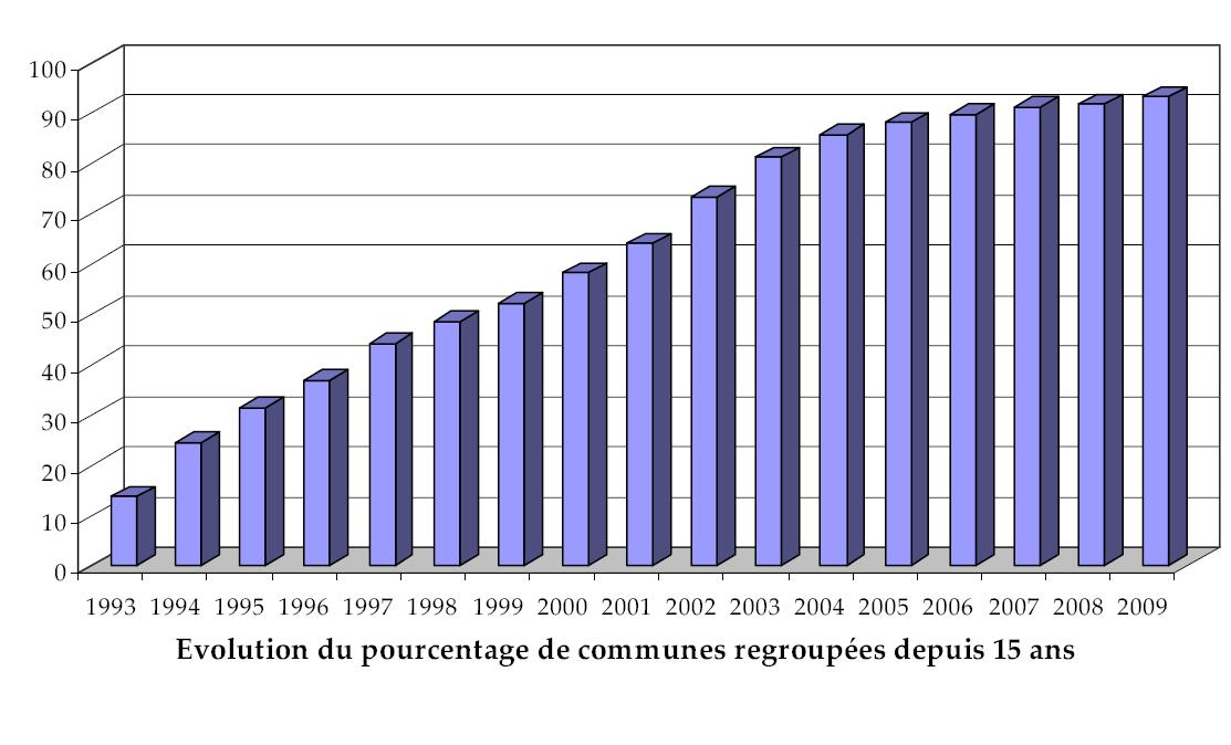 Evolution du pourcentage des communes regroupées en France depuis 15 ans.